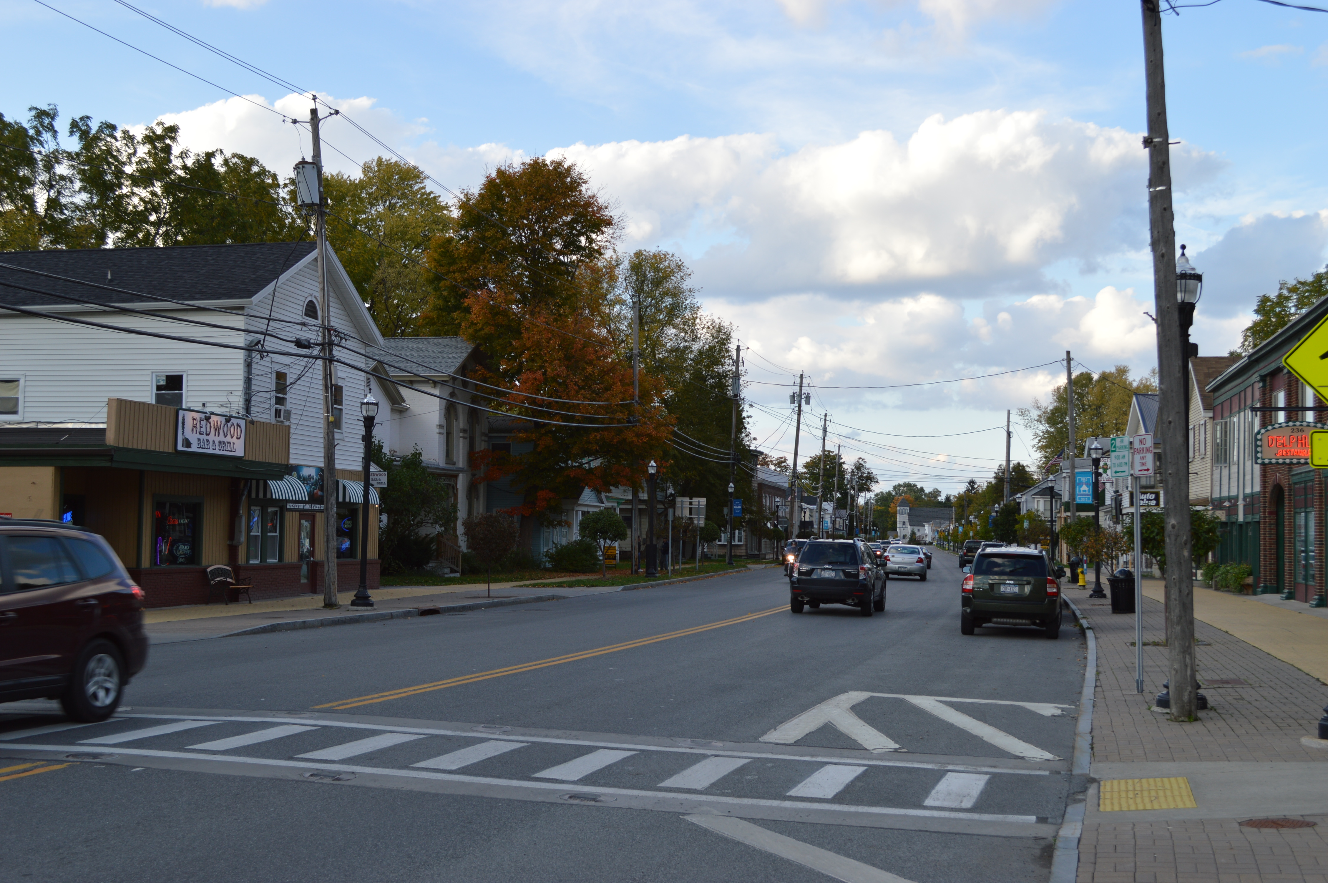 Chittenango, NY 13037, USA